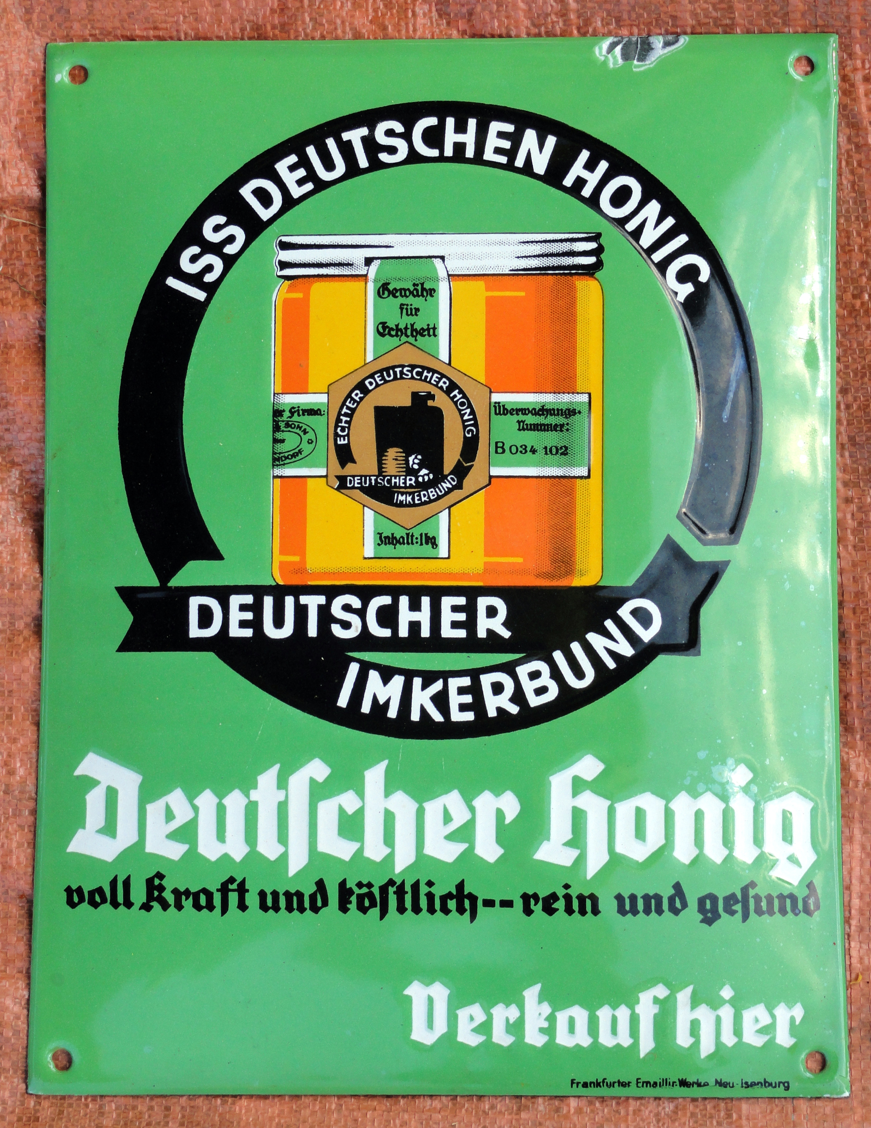 Emaille-Schild "Deutscher Honig voll Kraft und köstlich -- rein und gesund"